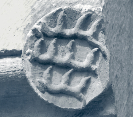 Württemberger Wappen der Grafen von Grüningen am mittelalterlichen Sockel des evang. Pfarrhauses in Markgröningen (13. Jhdt.)